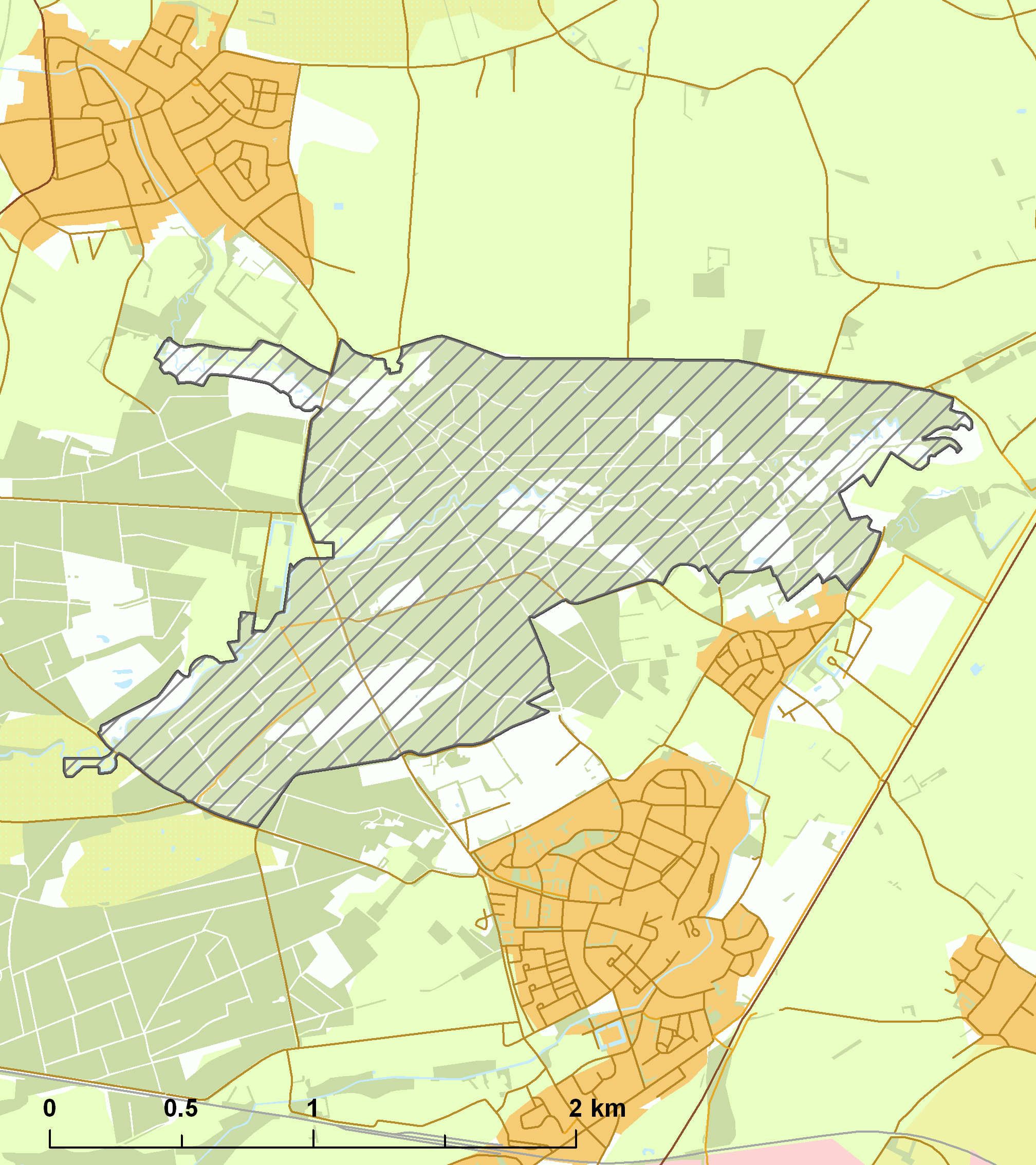 Natura2000 - Leudal.png